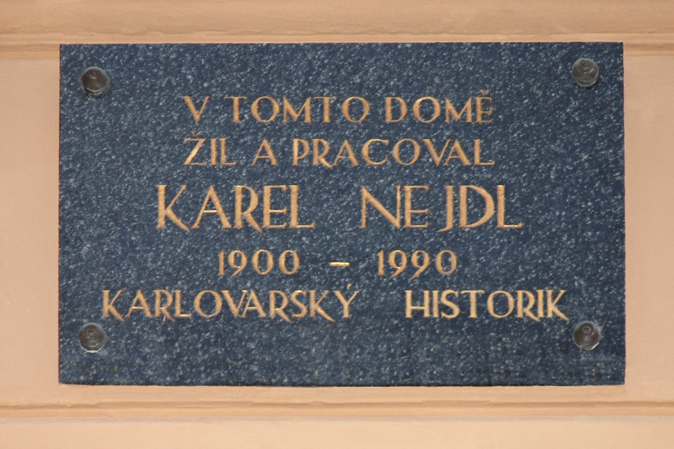 Pamětní deska na domě, kde Karel Nejdl žil – Sadová 34, Karlovy Vary